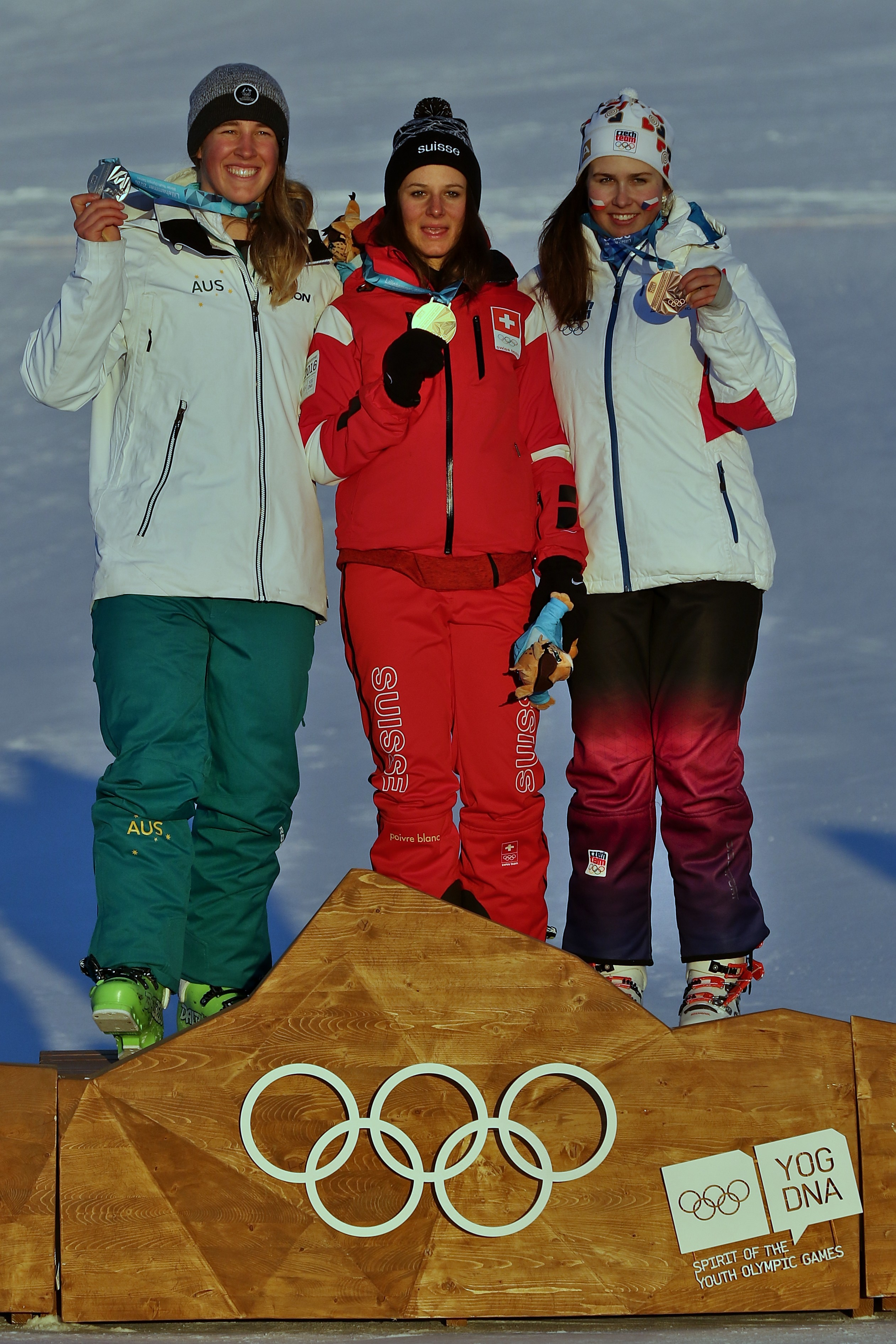 Lillehammer 2016 Ski cross - Talina Gantenbein (SWI, gold), Zali Offord (AUS, silver), Klára Kašparová (CZE, bronze)